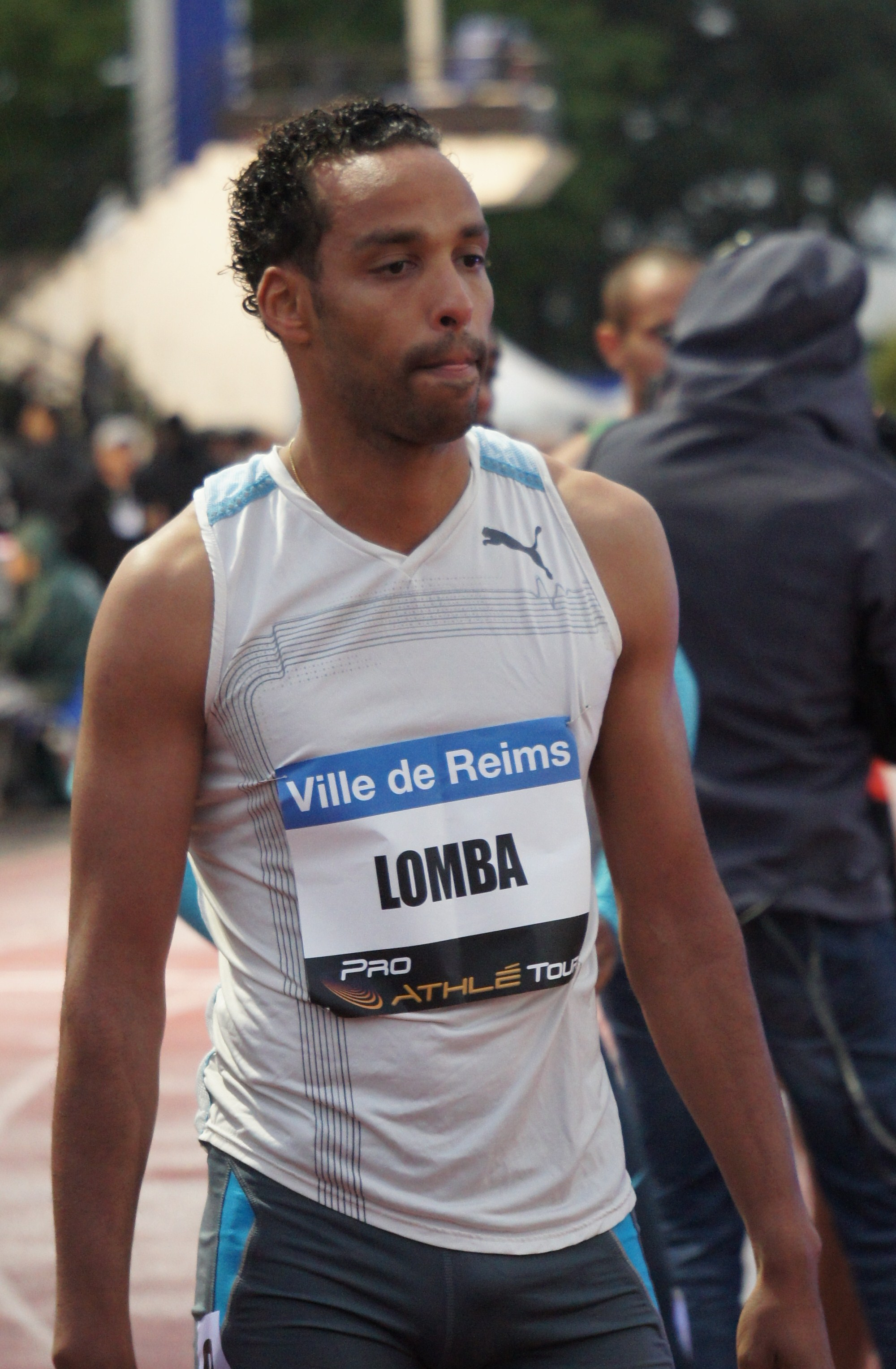 Jimmy Lomba lors des Rencontres d'athlétisme de Reims 2013